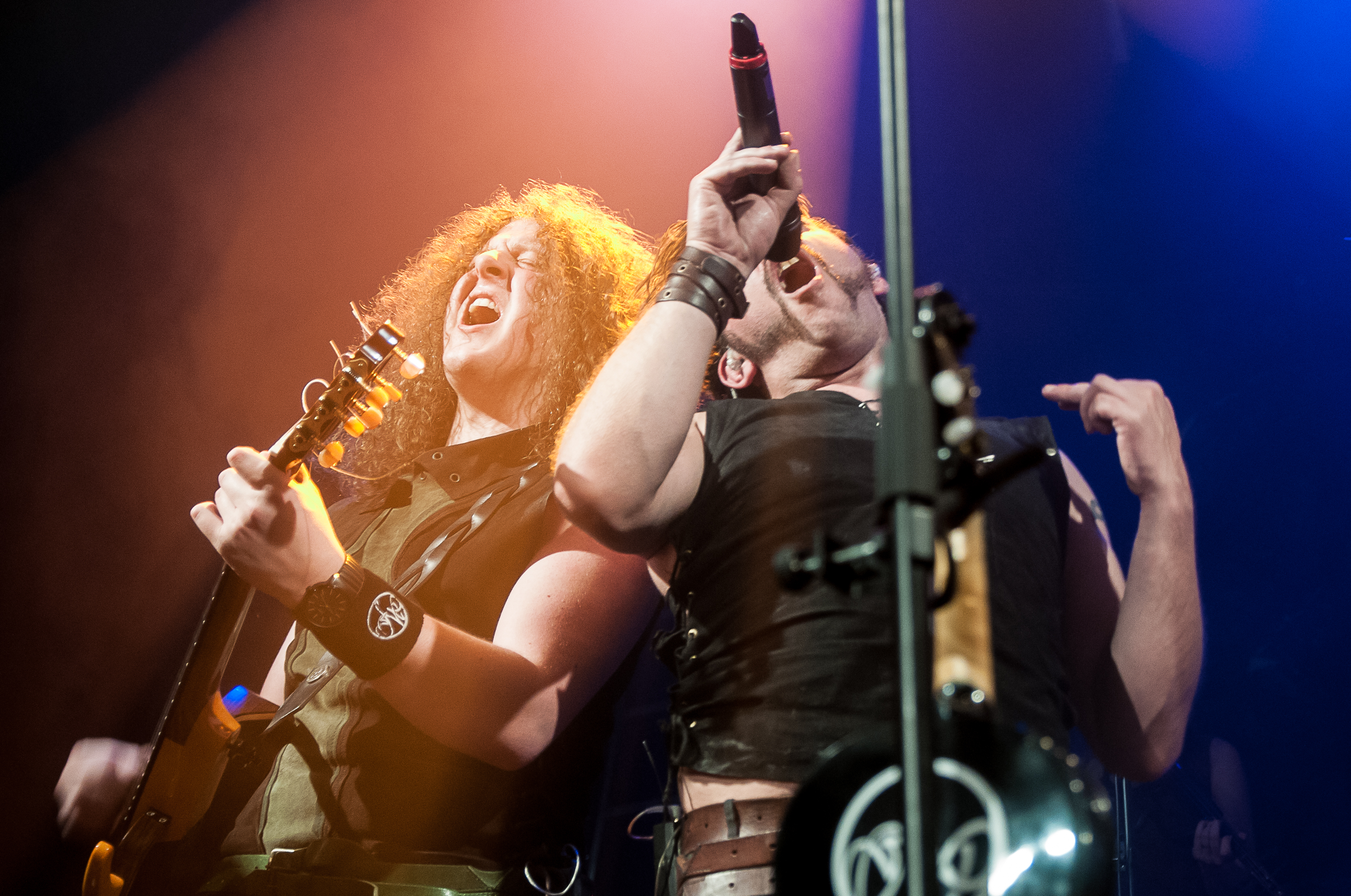 Bastian Brenner und Stefan Friodrich von Fuchsteufelswild